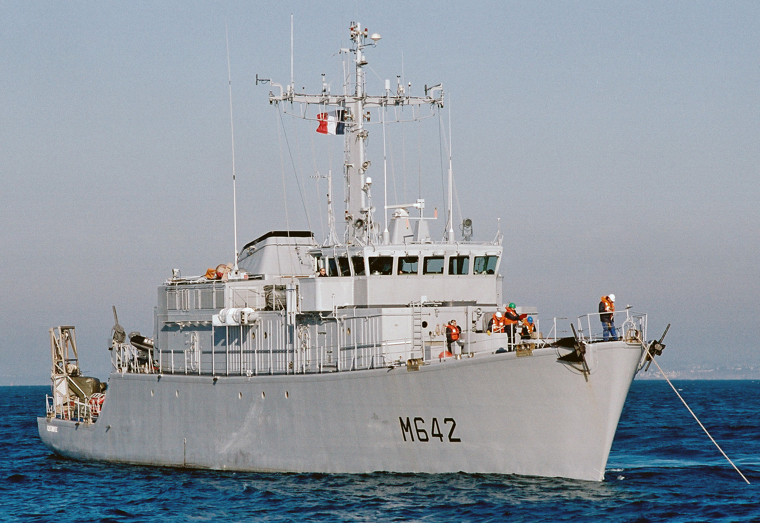 Activité sur le CMT Cassiopée.